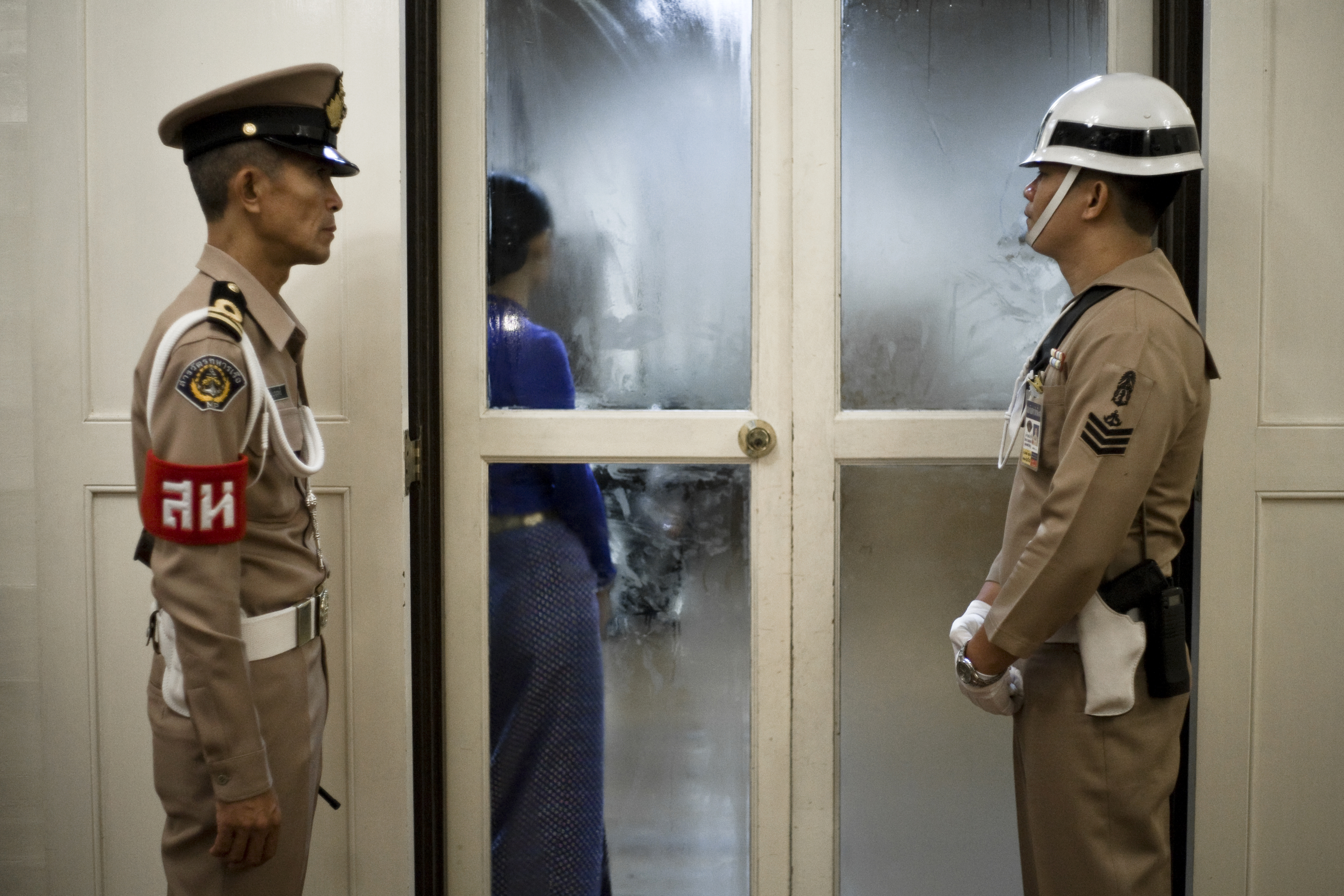 นายกรัฐมนตรี เป็นประธานเปิดงาน The Guardian Observer Travel Awards 2009 ณ ห้องชมวัง หอประชุมกองทัพเรือ กรุงเทพฯ 16ตุลาคม2552 (The Official Site of The Prime Minister of Thailand Photo by พีรพัฒน์ วิมลรังครัตน์)